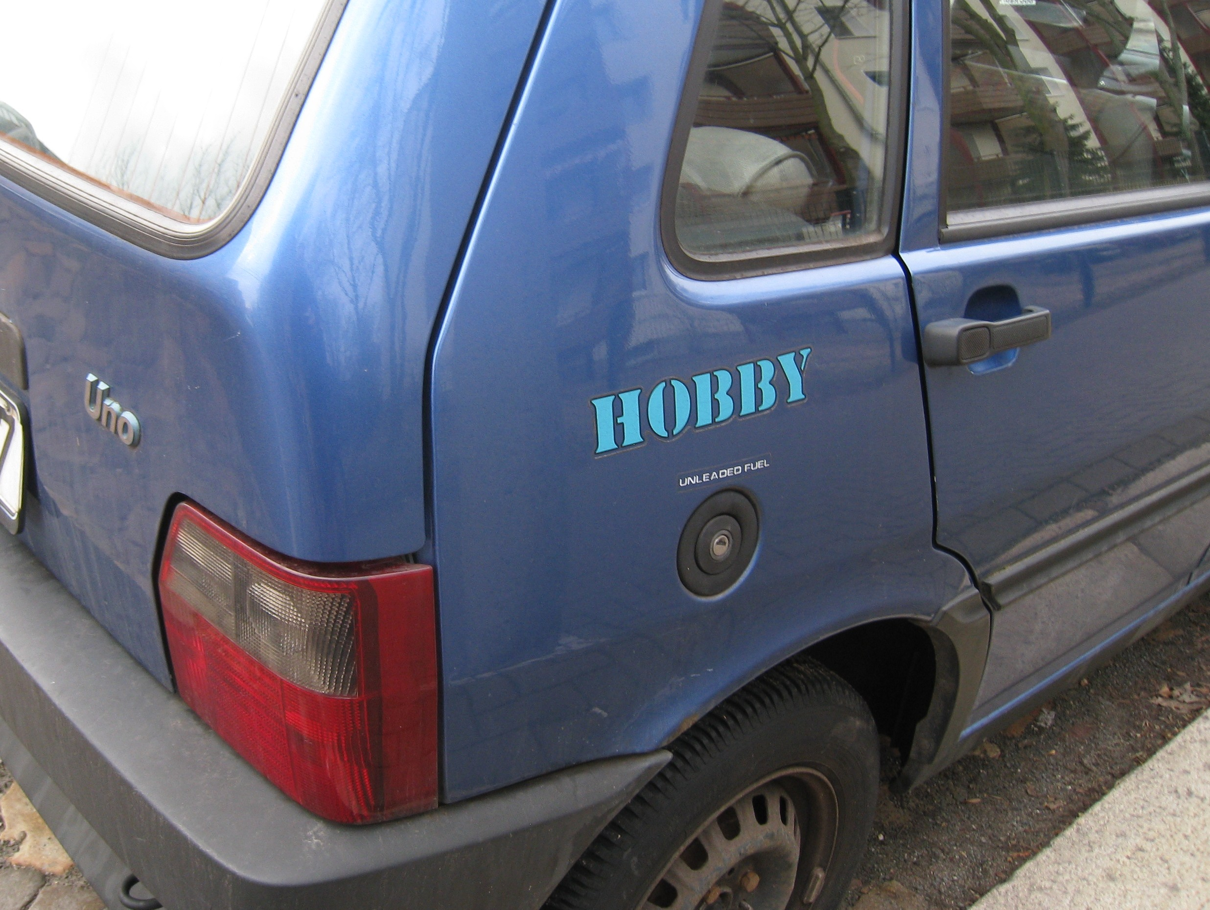 Fiat Uno Sondermodell Hobby